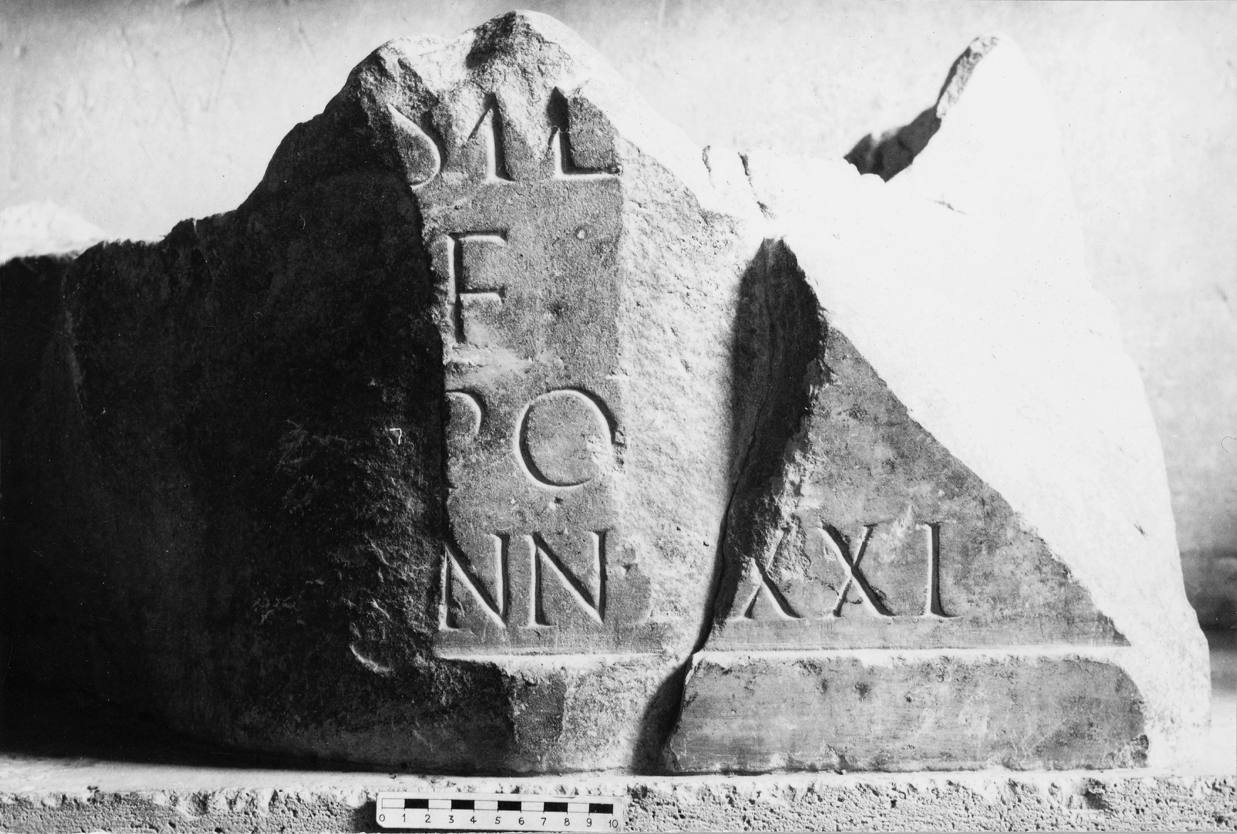 Уламок напису з бази скульптури Енея Сільвія на Форумі Августа